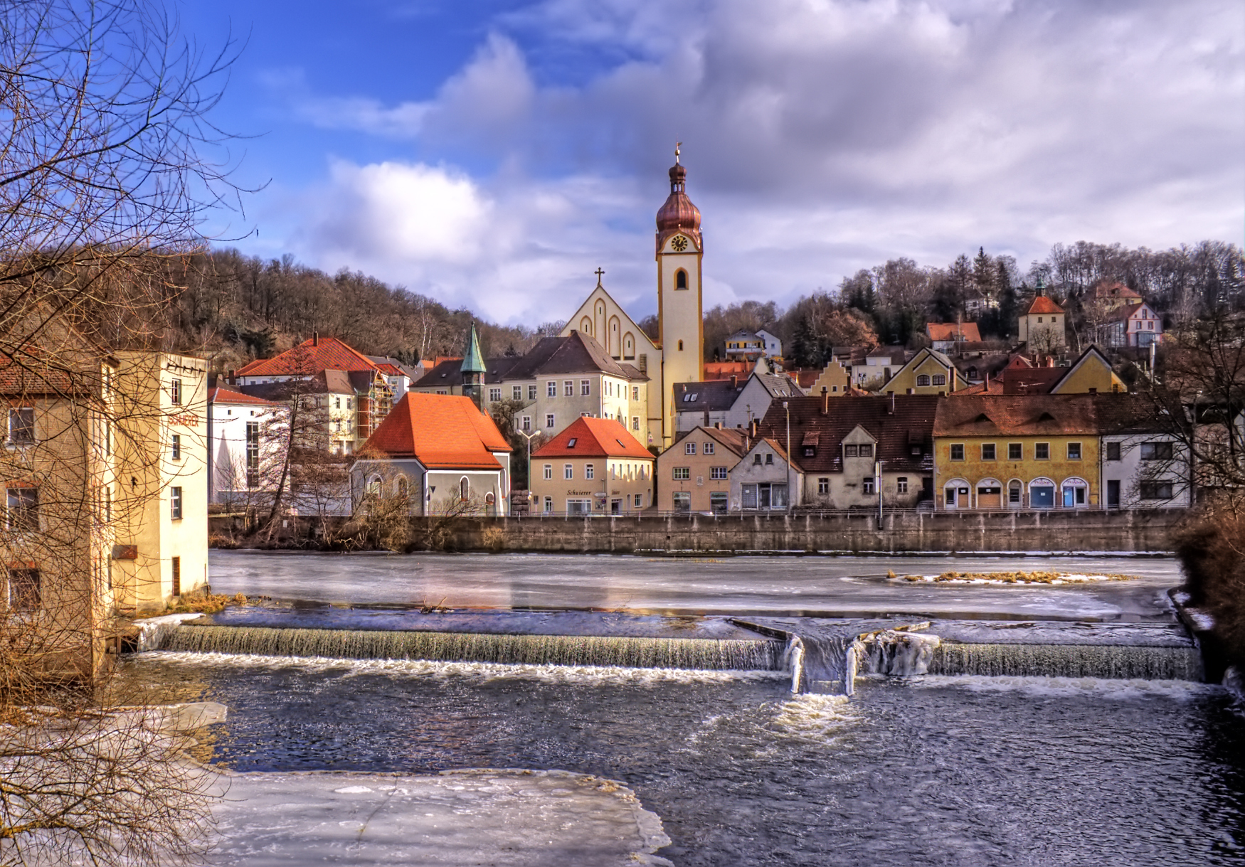 Naab bei Schwandorf mit Schuierermühle (links), Naabwehr (Vordergrund), Jakobskirche (großer Turm), Spitalkirche (Kapelle mit grünem Turmdach) und Blasturm (am Berg 3. Gebäude von rechts)